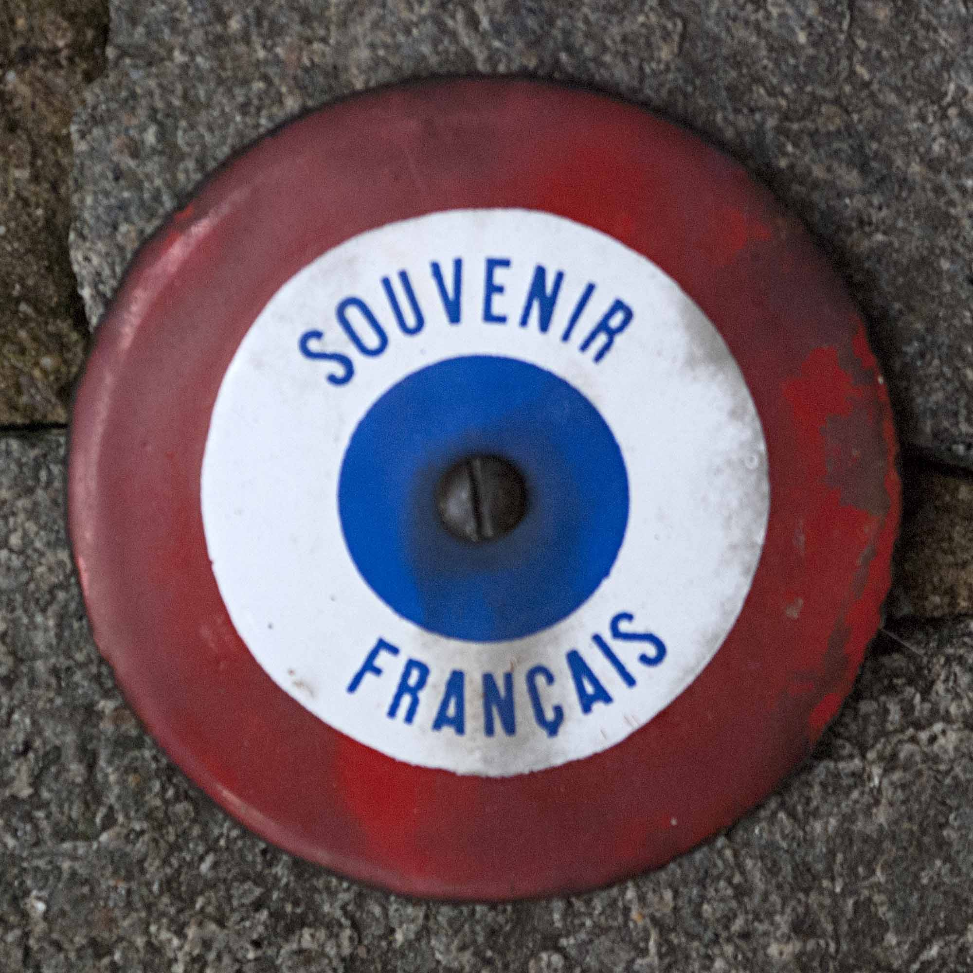 Souvenir français auf einem Grabstein auf dem Freidhof Mulhouse-Riedisheim